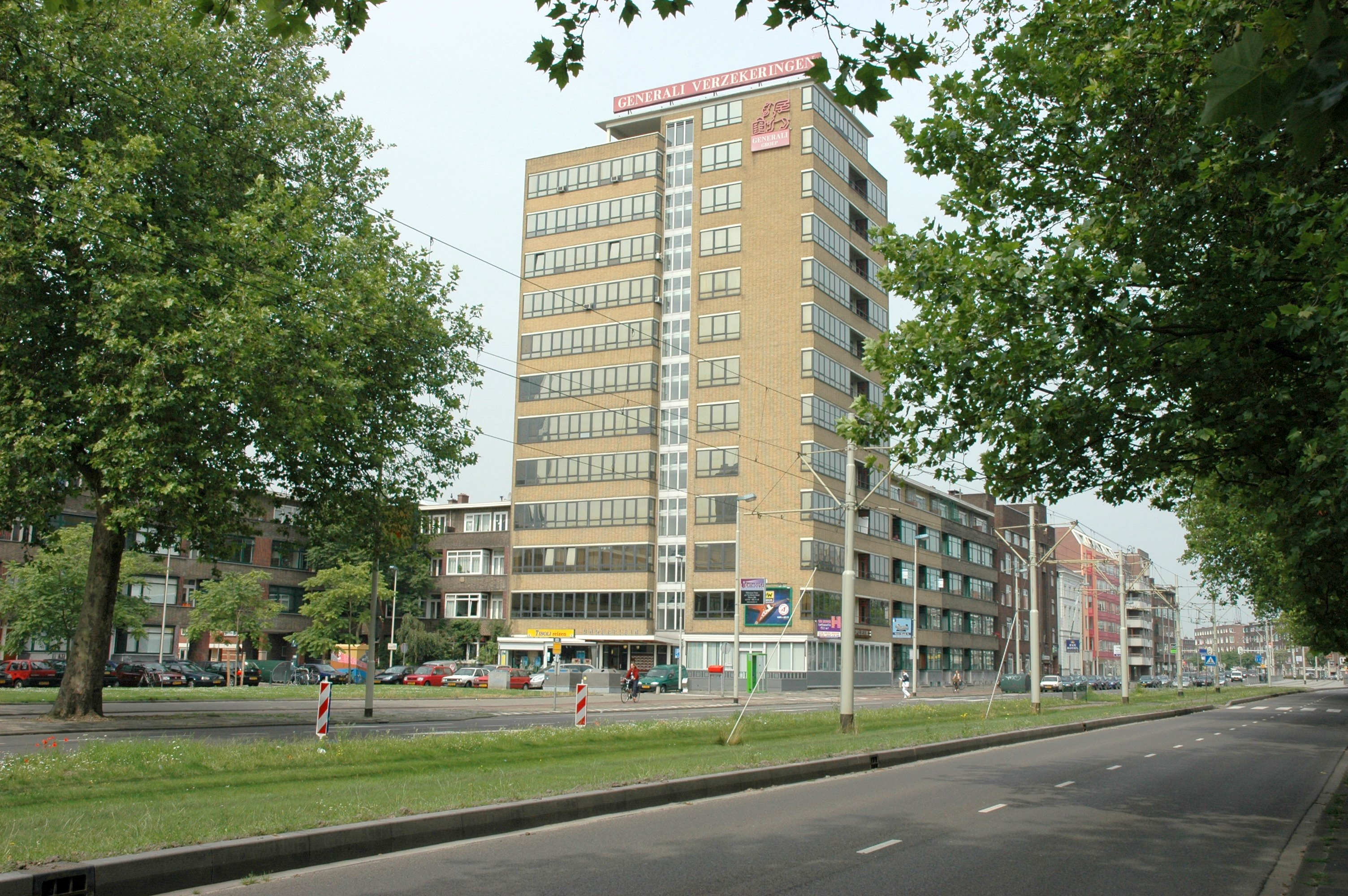 Schiekade, Rotterdam. Apartment building Ungerplein, J.H. van den Broek, 1928